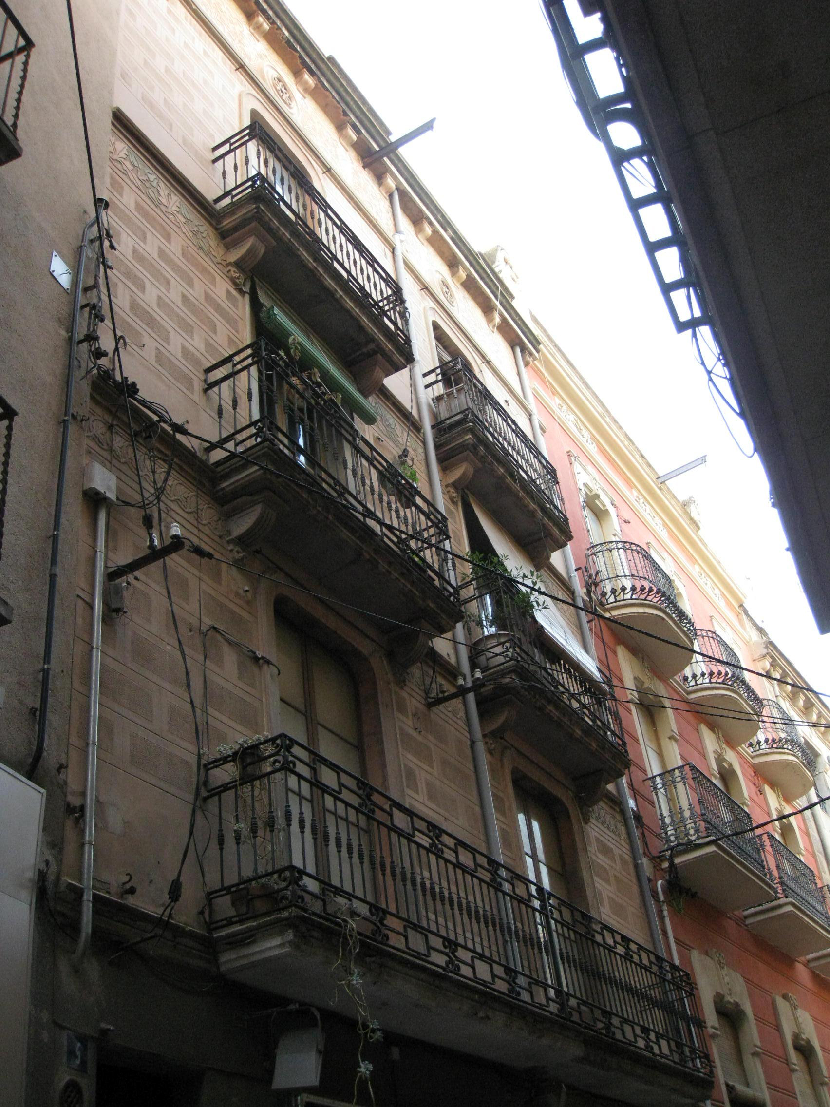 Casa al carrer Portella, 5 (Figueres)